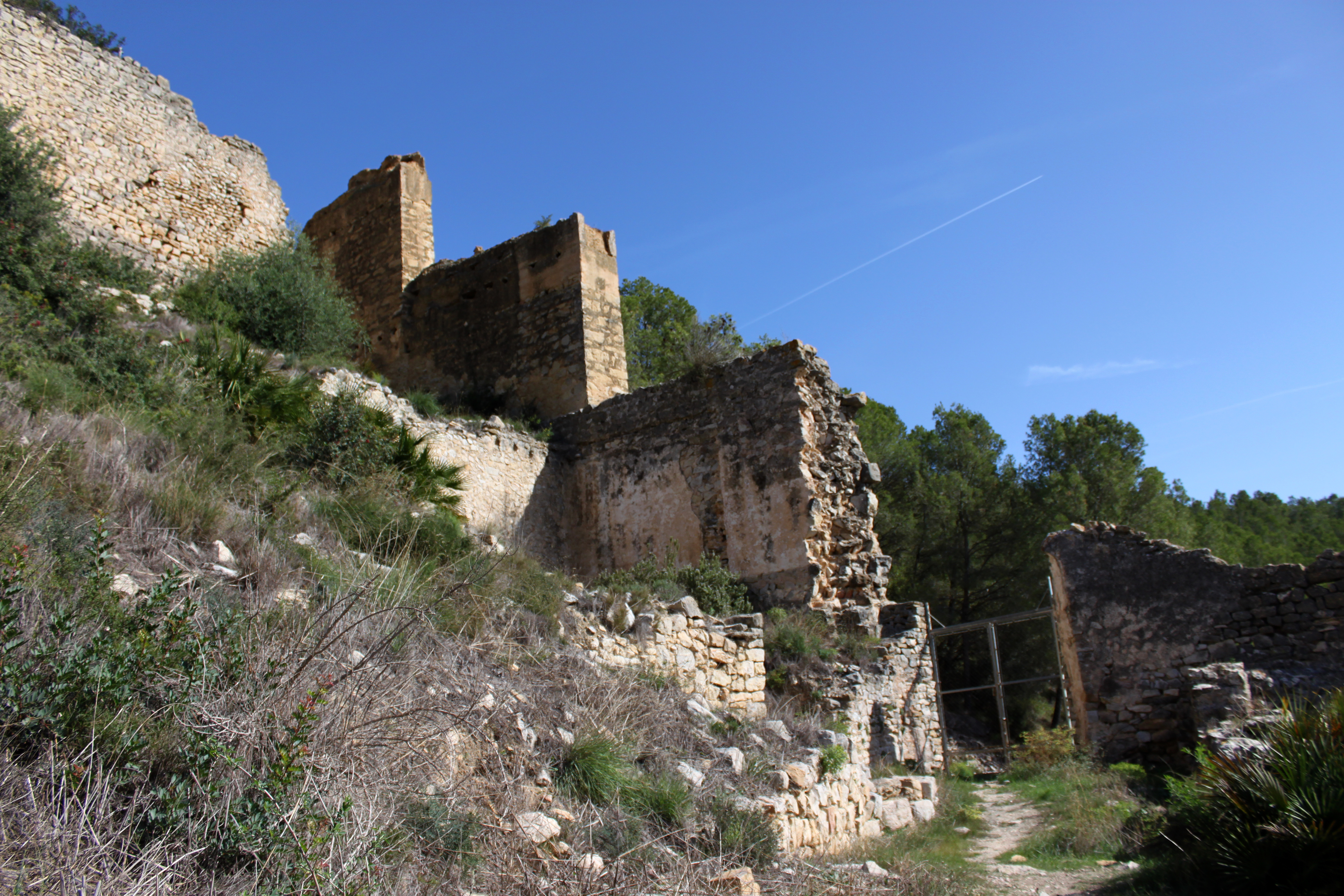 Castillo de Xivert. Muralla de la medina andalusí. Tras la toma de la fortaleza en el siglo XIII la población de su interior tuvo que trasladarse a la ladera norte para permitir la ampliación de las murallas. Se observa en la imagen parte de las construcciones de la medina, concretamente un edificio de grandes dimensiones con una de sus muros junto a una de las calles y las murallas que la rodeaban. Alcalá de Xivert, provincia de Castellón, Comunidad Valenciana, España.